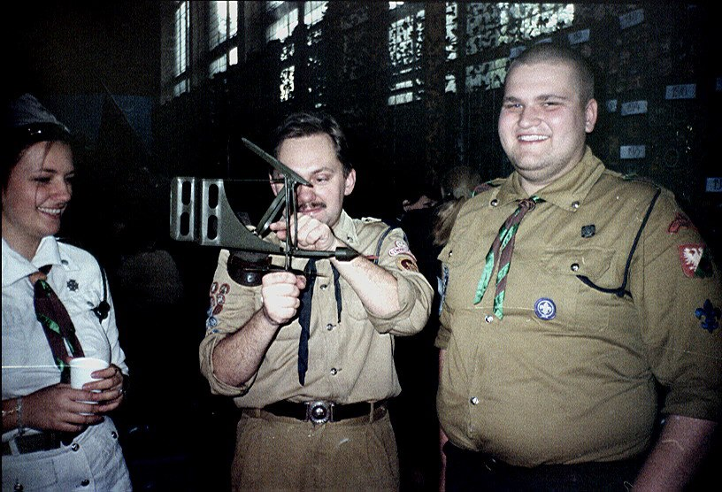 hm.Krzysztof Najberg oraz instruktorzy 2 DH "Trakt" podczas pokazu HOTiM w 1999 roku.